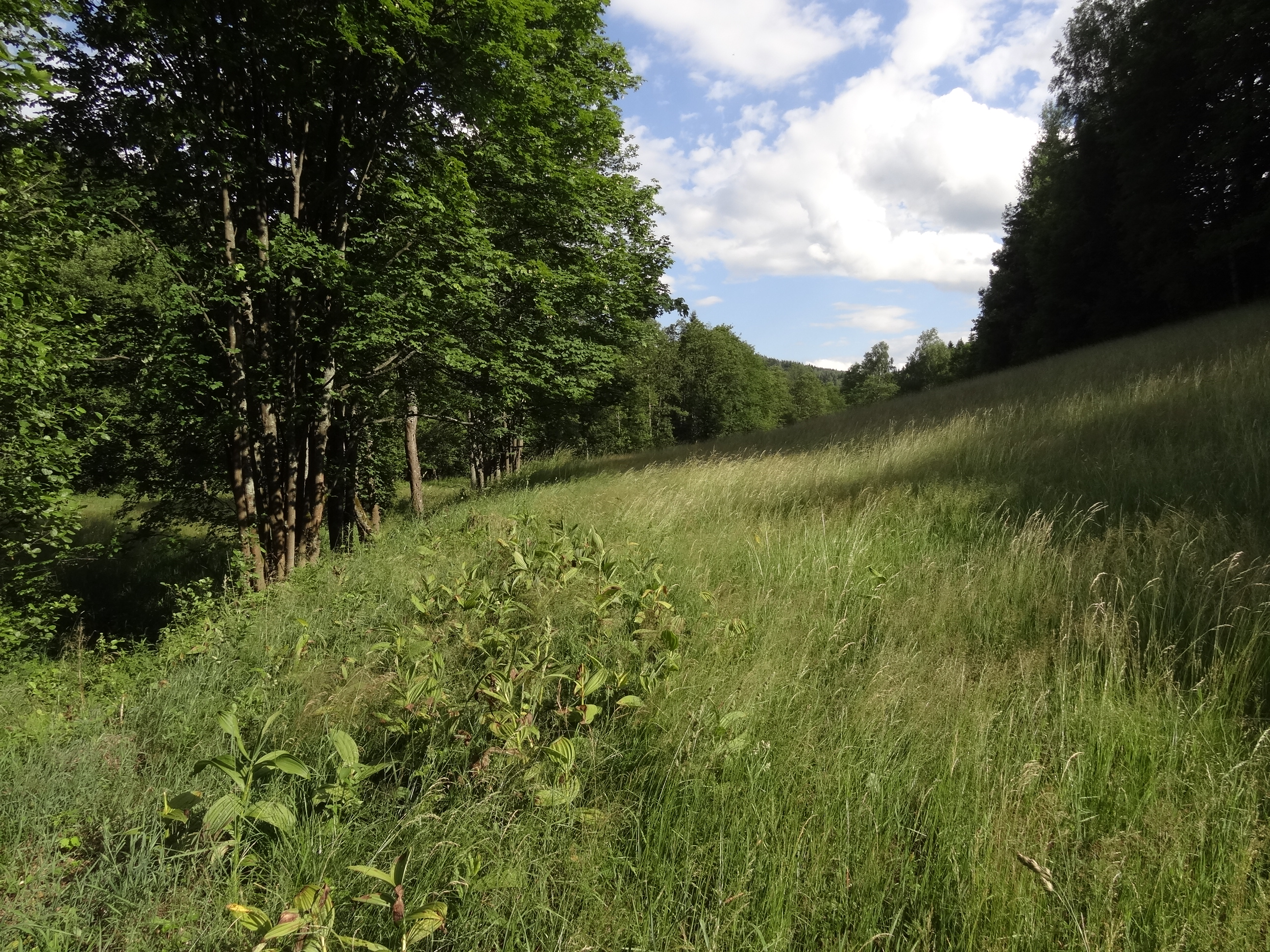 PR Neratovské louky